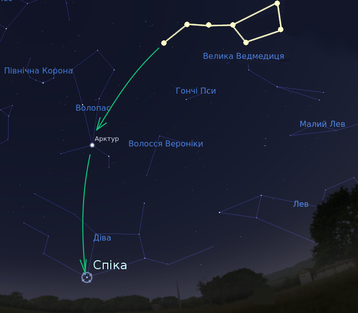 Схема, що ілюструє, як знайти Спіку із сузір'я Діви на нічному небі